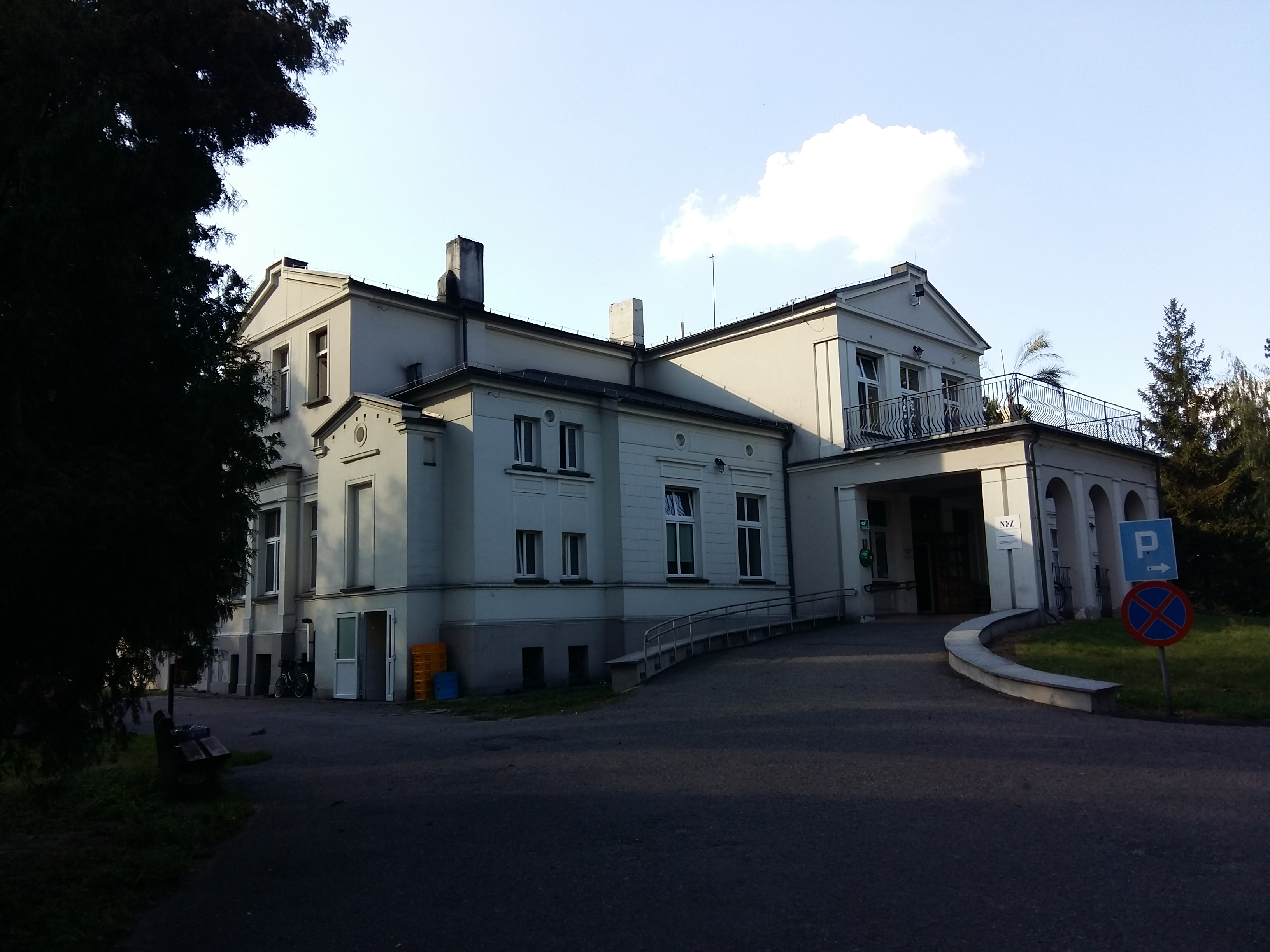 Neoklasycystyczny pałac z XIX wieku.